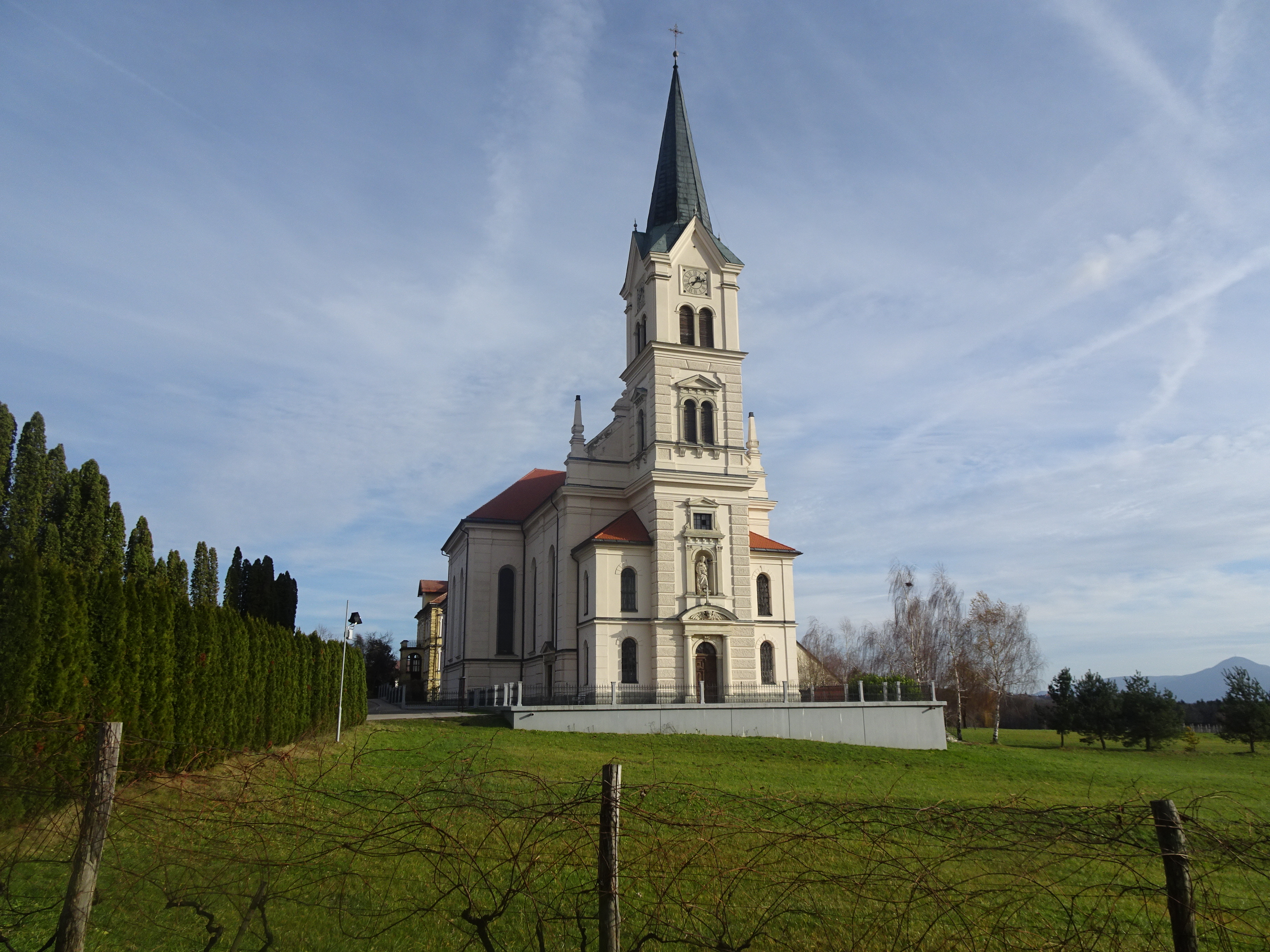 Župnijska cerkev Čadram-Oplotnica